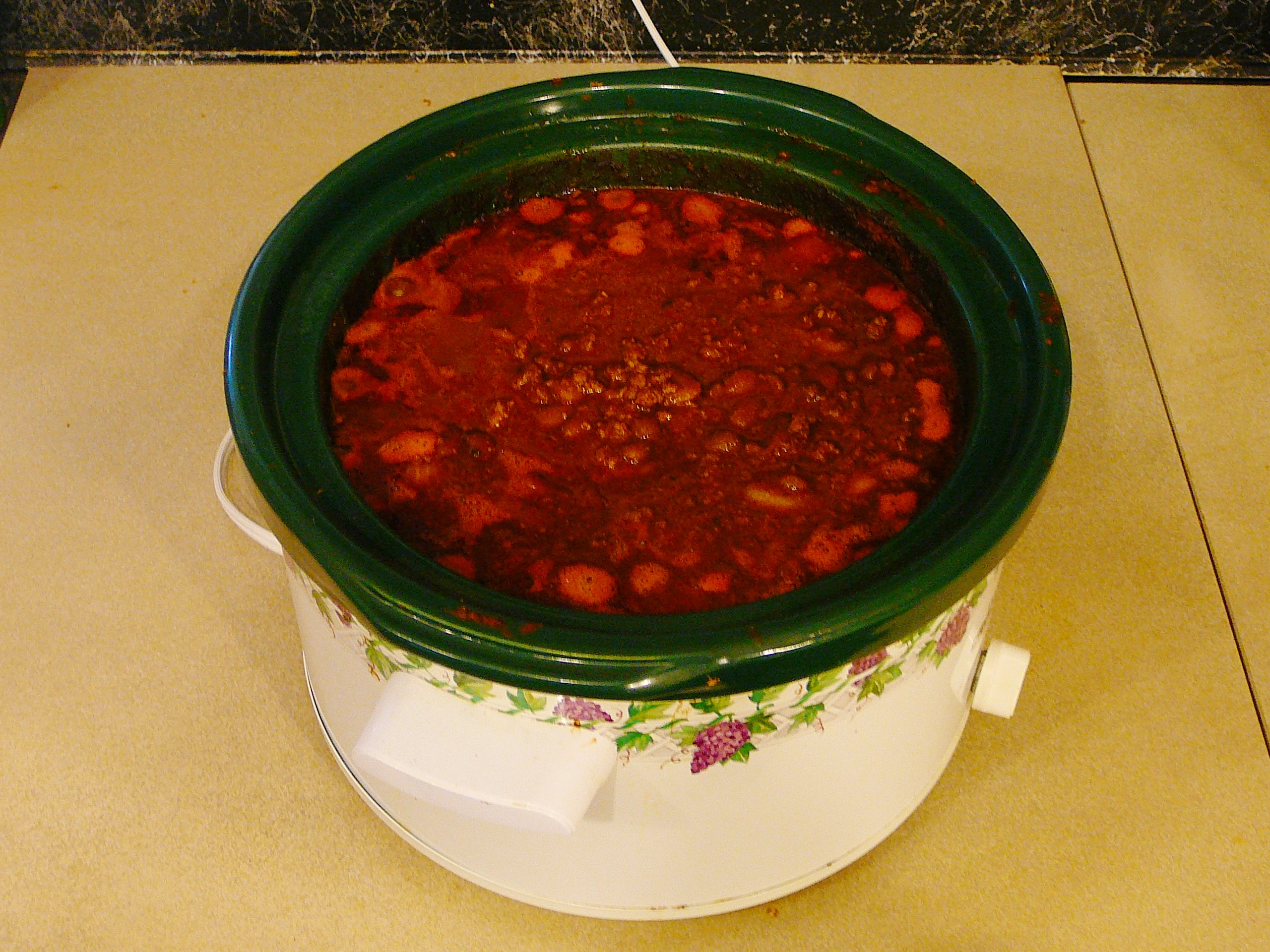 Homemade chili, self made